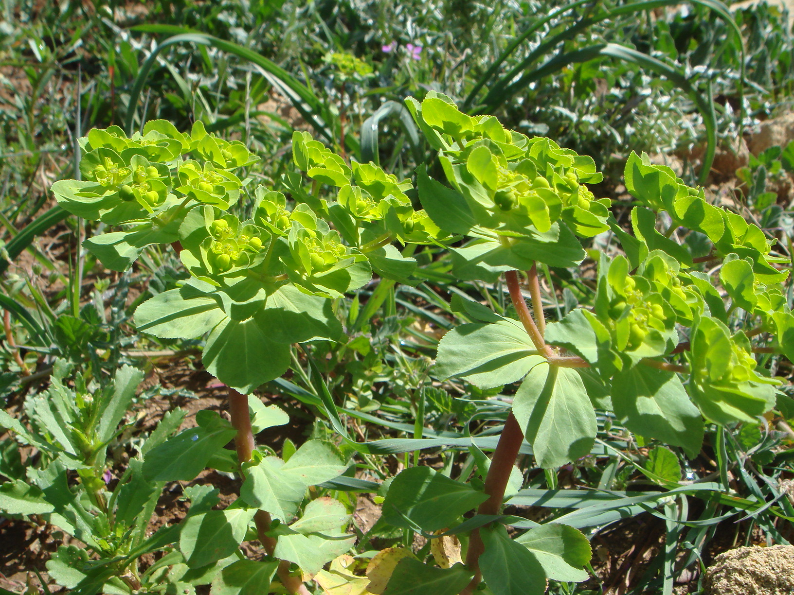 Euphorbia helioscopia, El Bosque, Cádiz, España